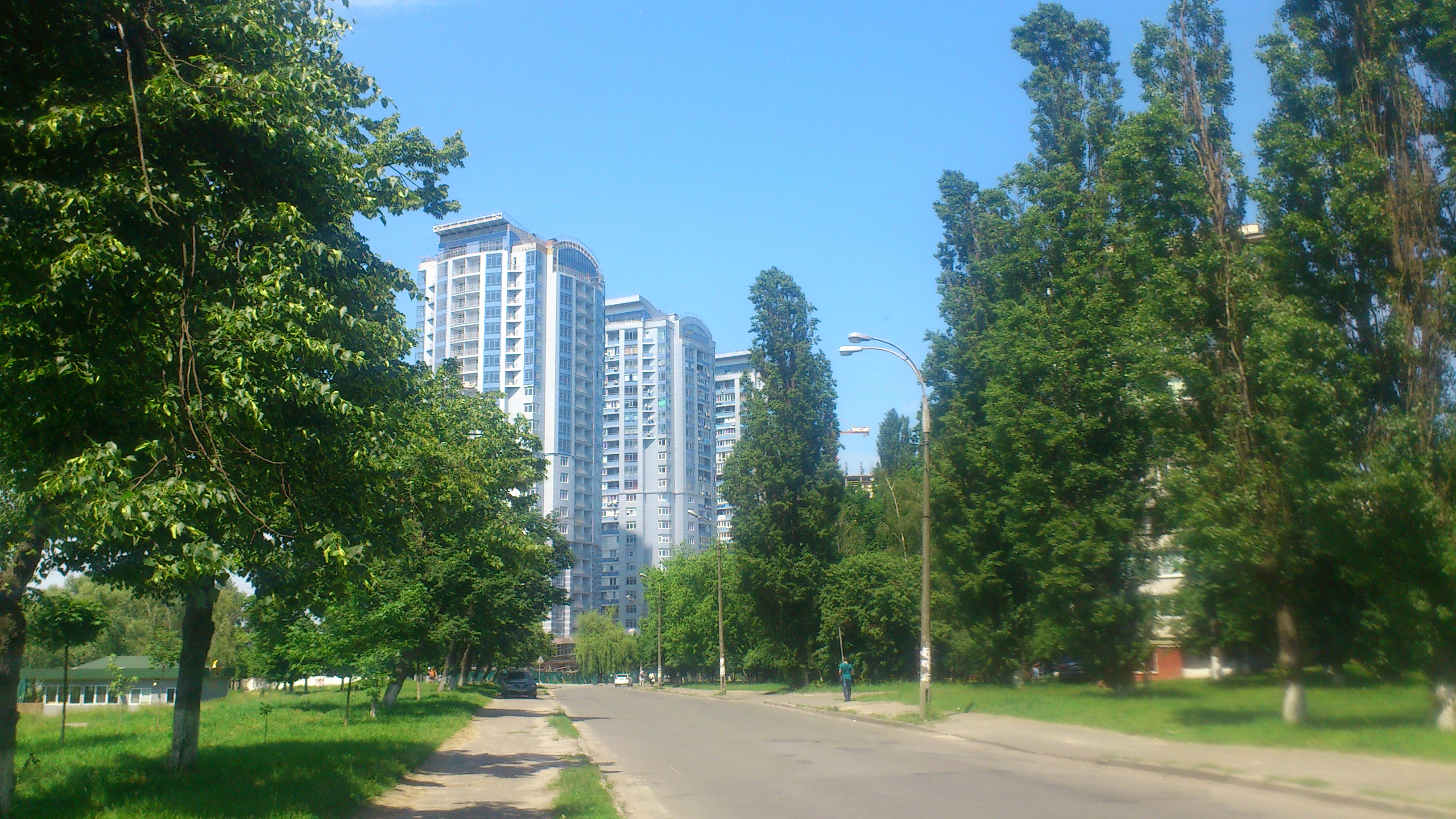 Вулиця Миколи Ушакова (Київ)